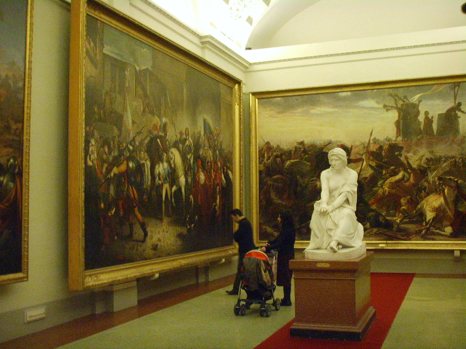 Galleria d'arte moderna, firenze